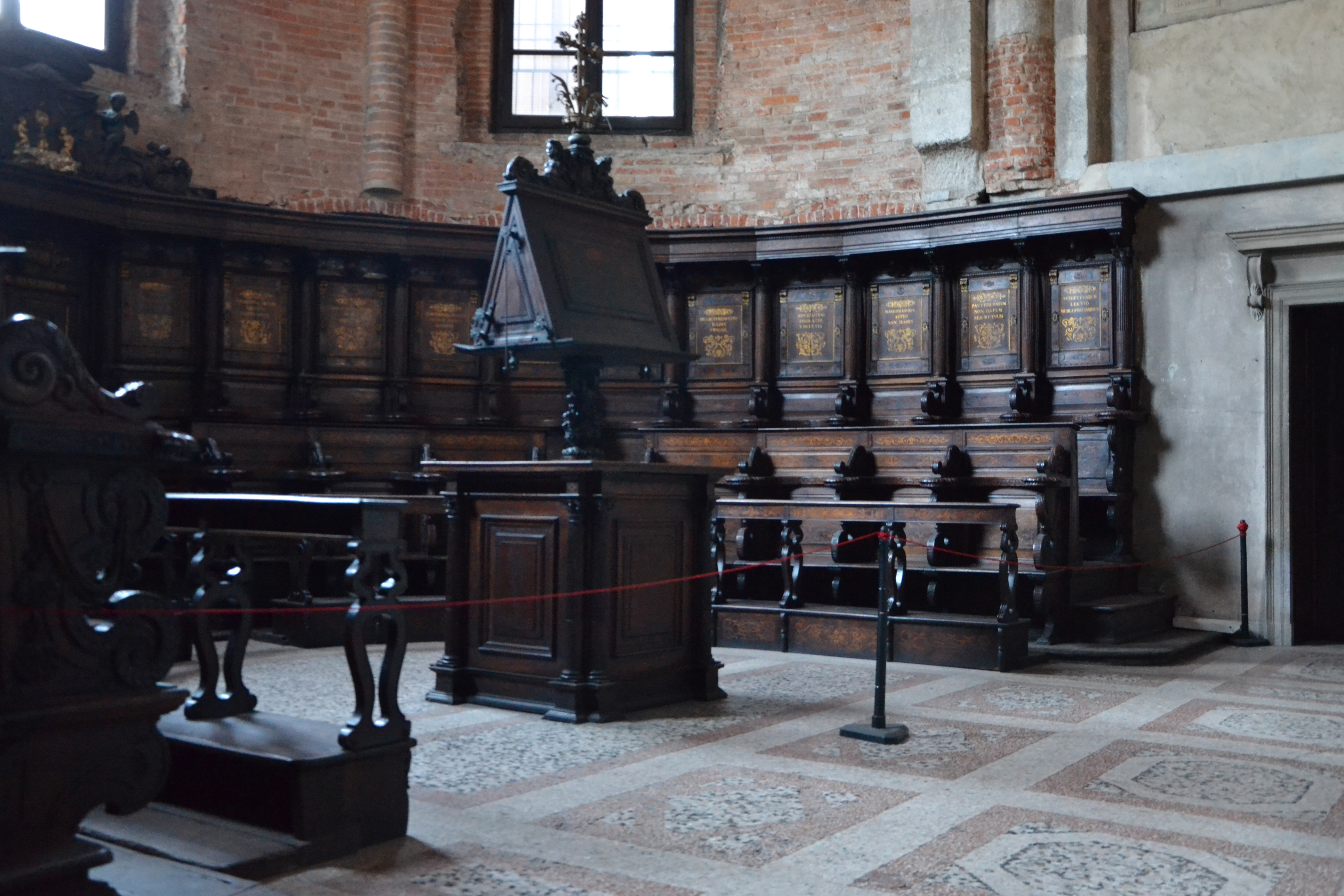 Basilica di San simpliciano (Milano)